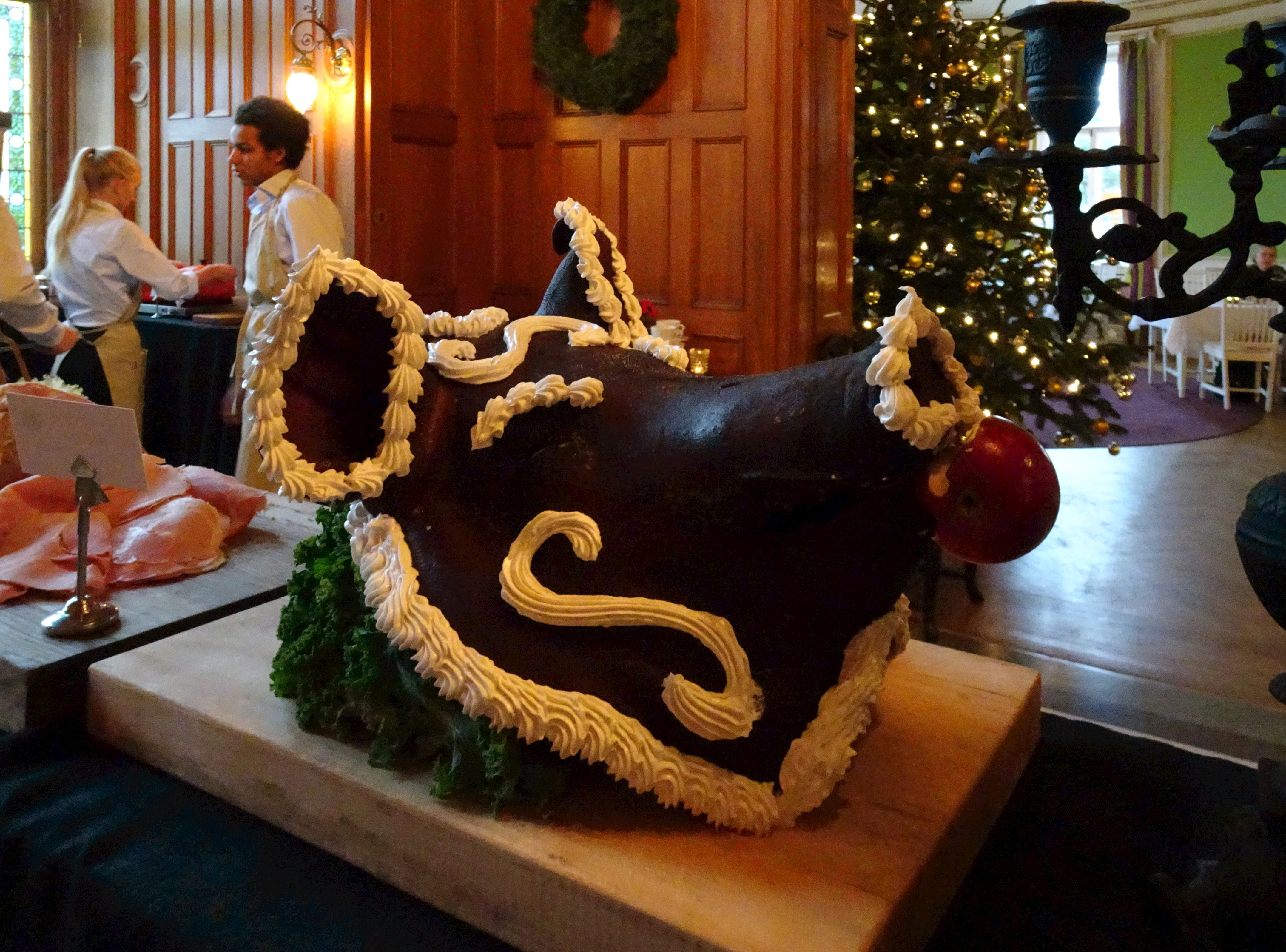 Villa Skärtofta, julbord